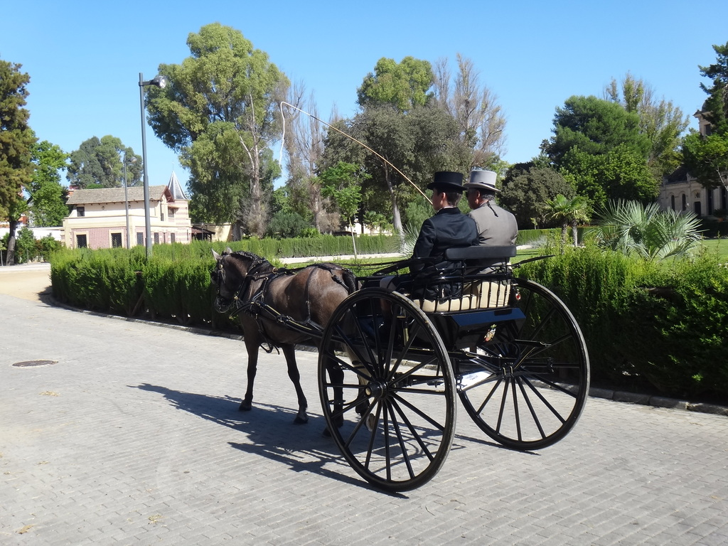 Carruaje de época en la Real Escuela Andaluza de Arte Ecuestre. Jerez de la Frontera (Andalucía, España)